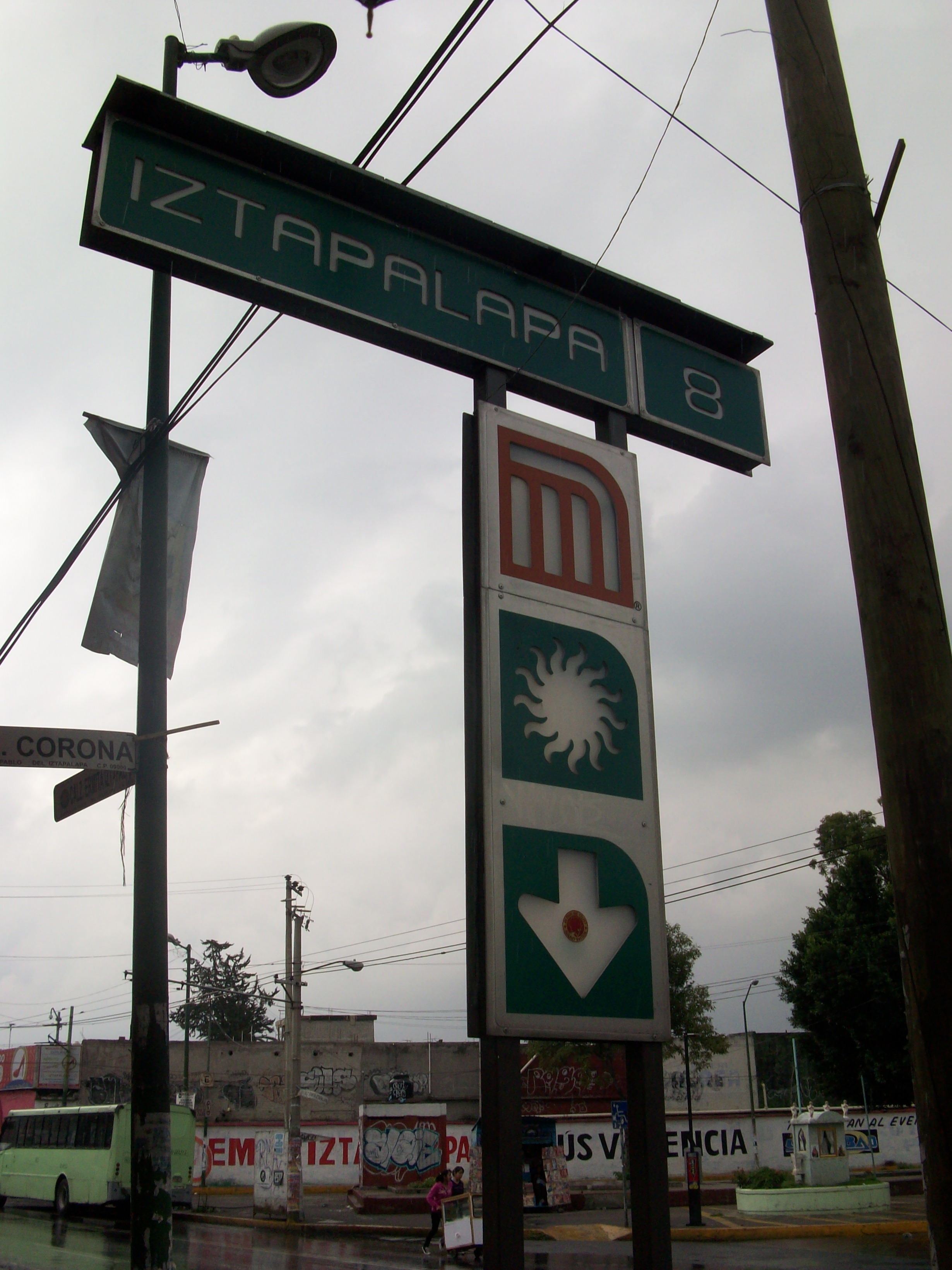 Estela estacion Iztapalapa